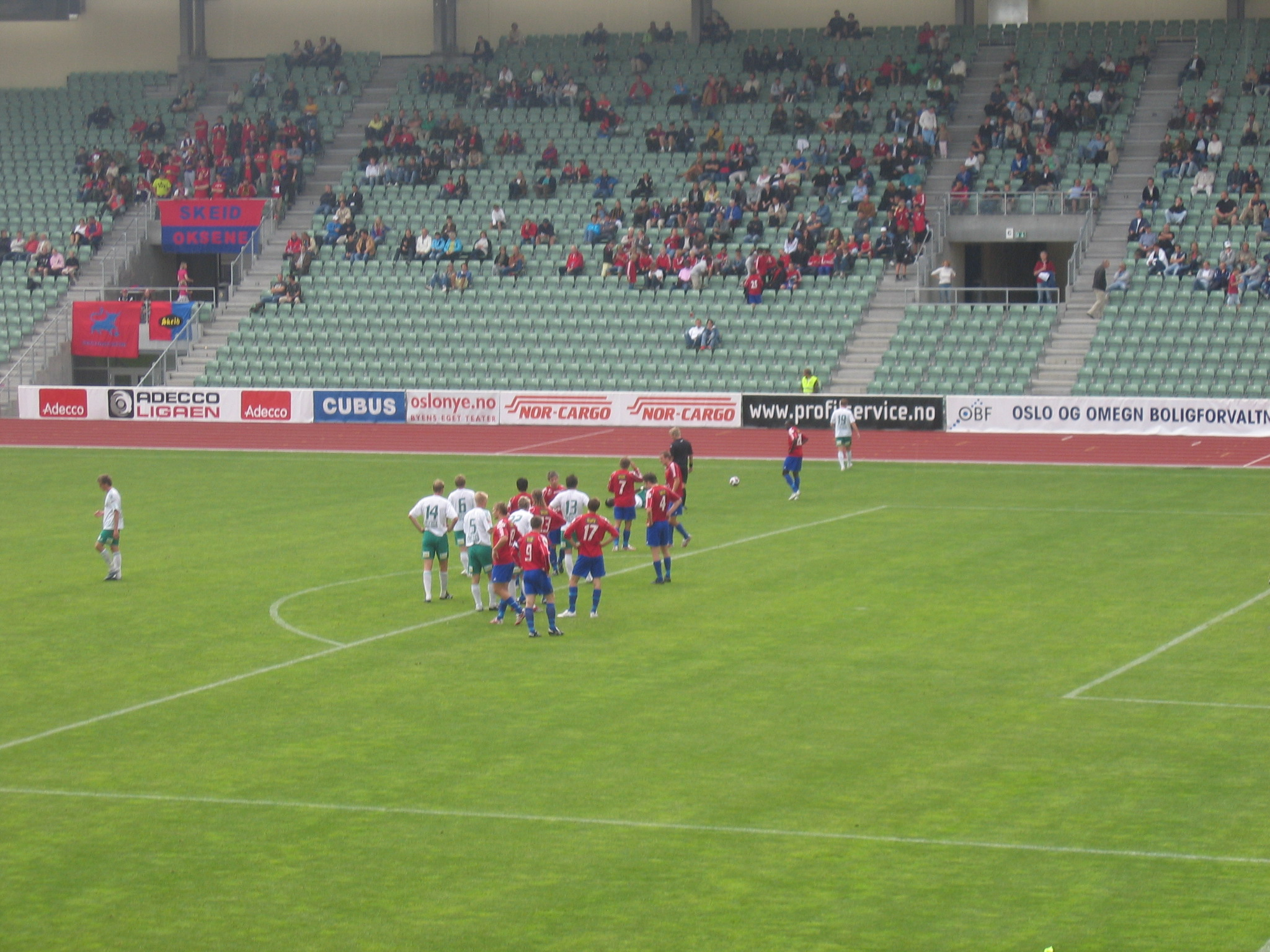 Skeid vs Ham-Kam at Bislett stadium in Oslo, Norway.